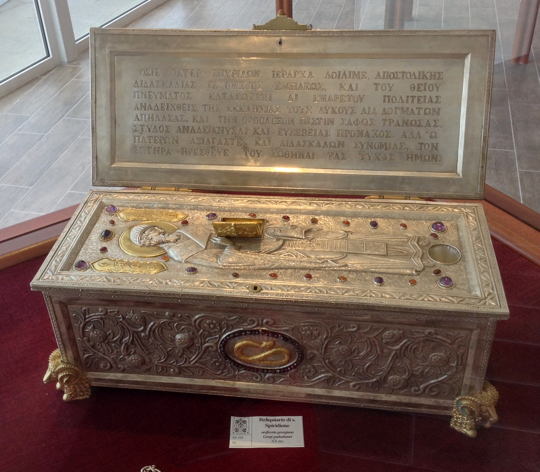 Reliquiario di San Spiridione; oreficeria georgiana, 20° secolo